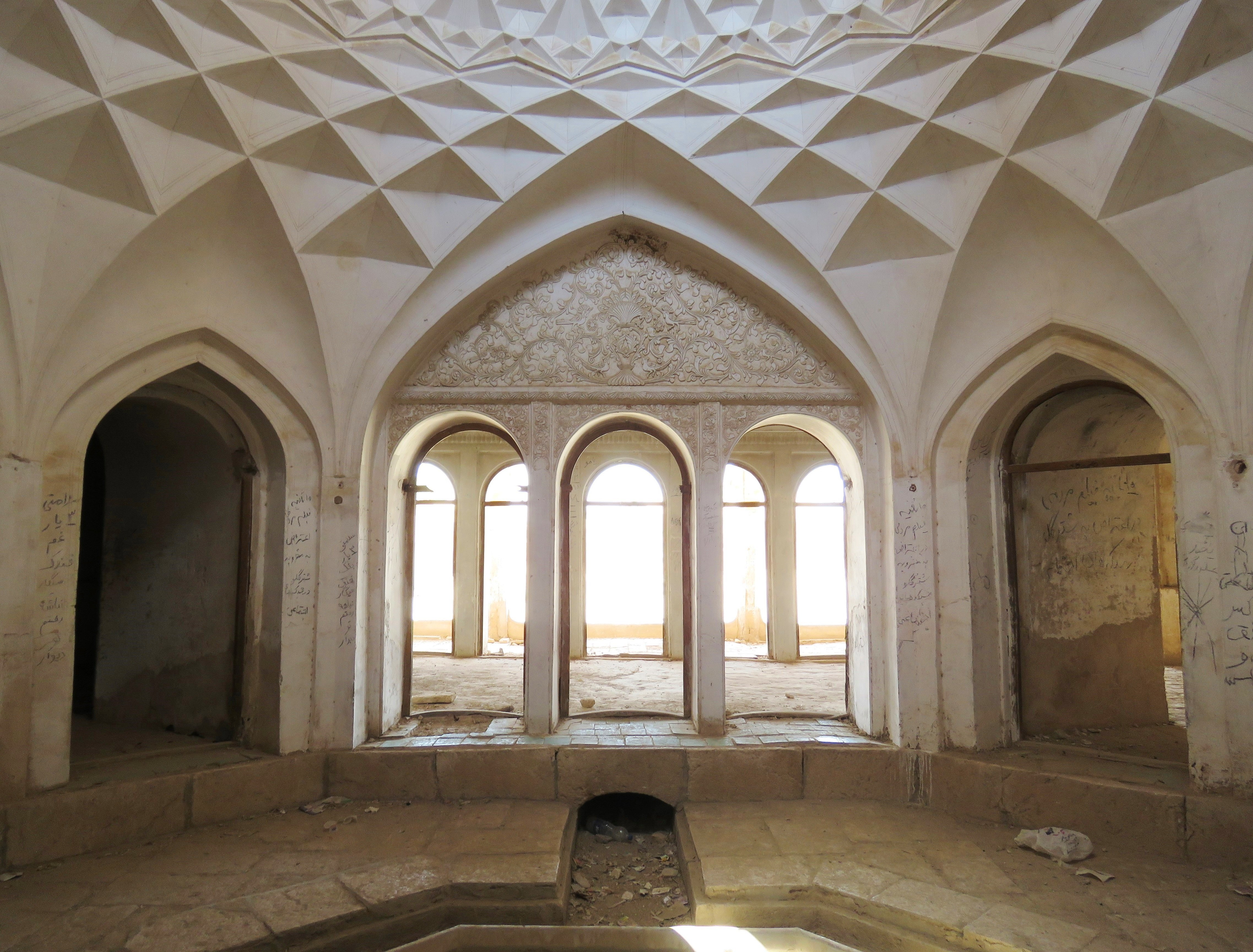 عمارت شتر گلو